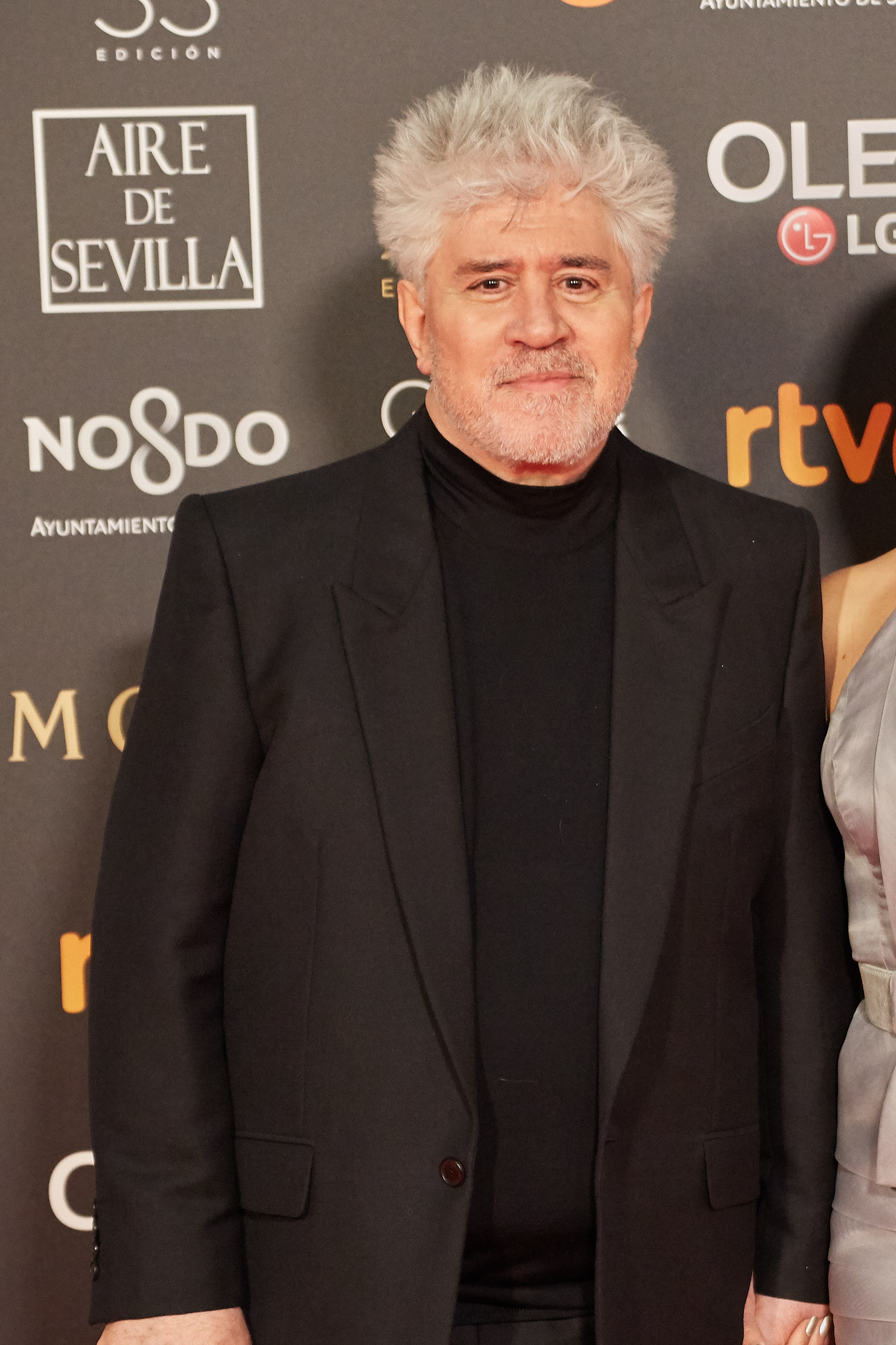 Pedro Almodóvar en la alfombra roja de los Premios Goya celebrados en Sevilla en Febrero 2019